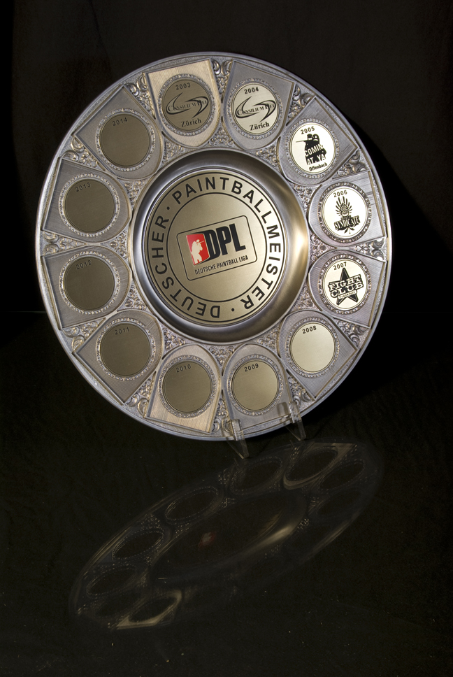 Meisterschale der deutschen Paintballliga DPL